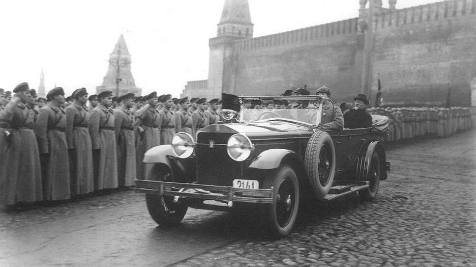 Автомобиль итальянской марки Isotta-Fraschini на Красной площади в Москве. На заднем сиденье председатель ВЦИК Михаил Калинин.